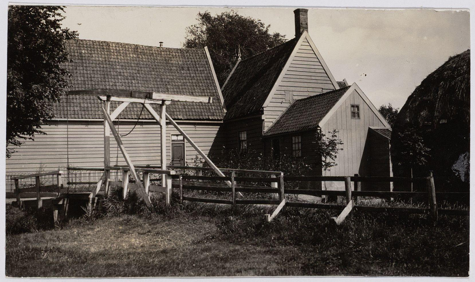 Beschrijving Durgerdam, Kerkpad Documenttype foto Vervaardiger Eck, J. van (Jacobus, 1873-1946) Collectie Collectie J. van Eck: foto's Datering 1922 Geografische naam Durgerdam Kerkpad Inventarissen Afbeeldingsbestand A01634000303 Generated with Dememorixer